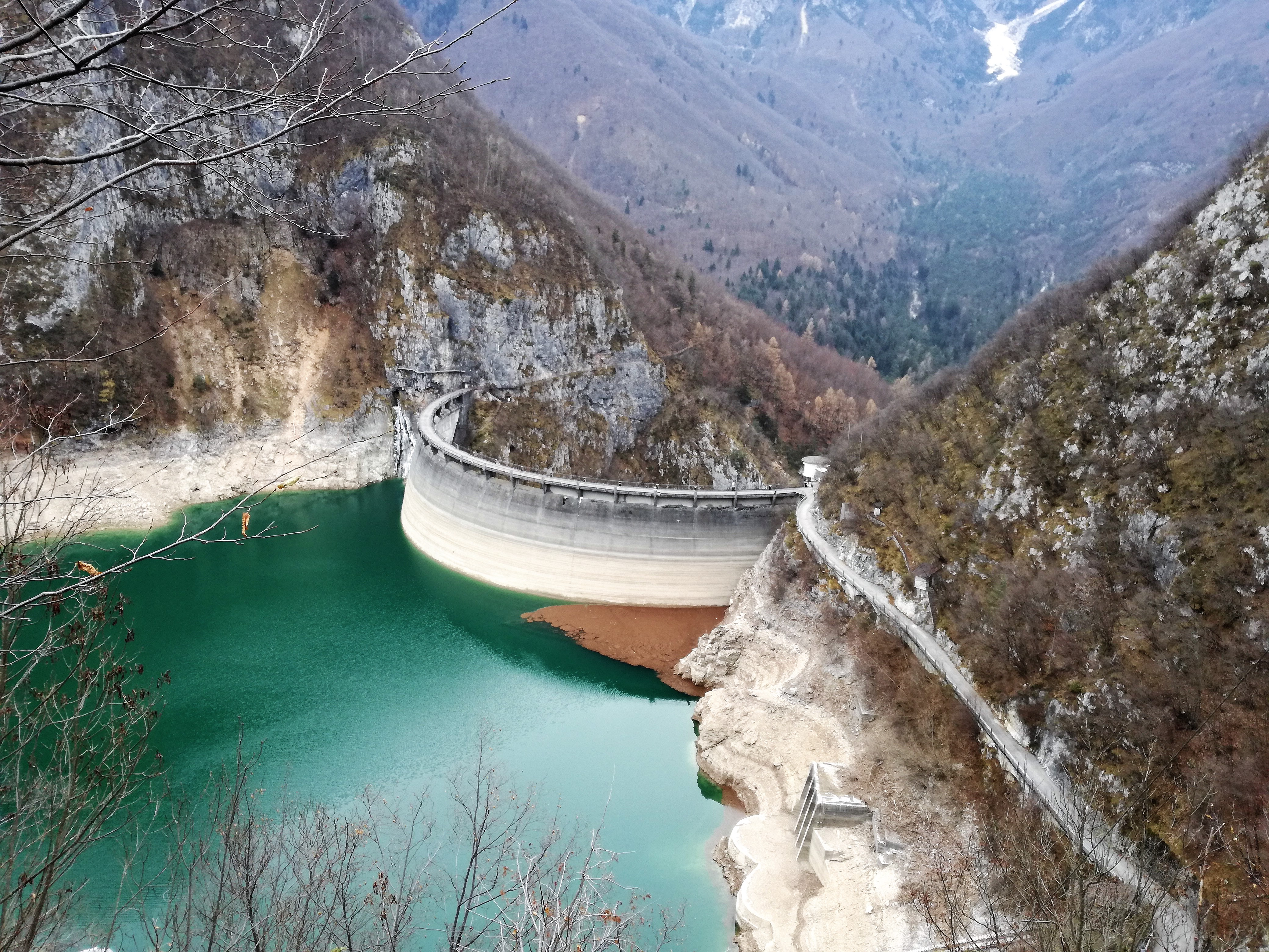 Staumauer Speccheri-Talsperre